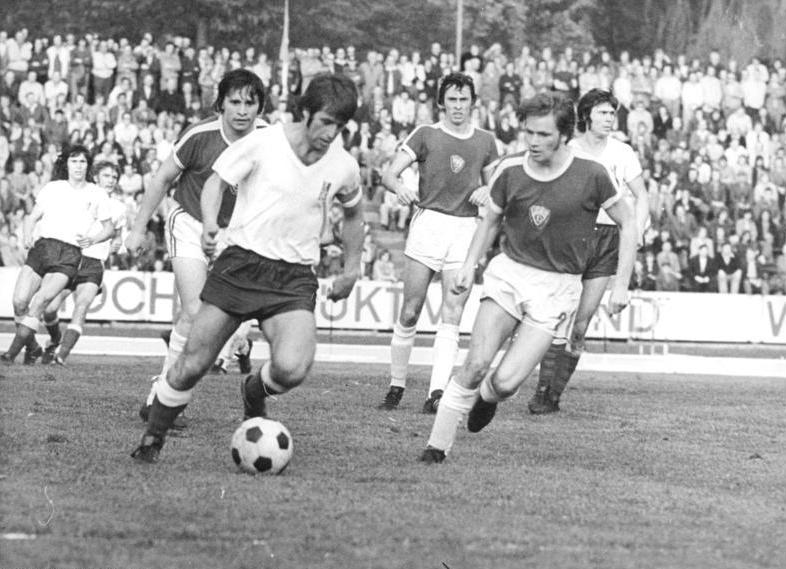 ADN-ZB-Ludwig-12.5.76-Erfurt: Fußball-Oberliga FC Rot-Weiß Erfurt-BFC Dynamo 1: 3-Der Erfurter Hans-Günter Schroder (am Ball) versucht sich gegen Michael Noack (rechts daneben) durchzusetzen.Dahinter links Ralf Schulenberg und rechts Bernhard Jonelat (alle BFC Dynamo) .